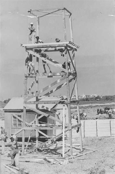 עליית עין המפרץ - מגדל הנקודה החדשה באופק עכו. מספר תמונה D721-012